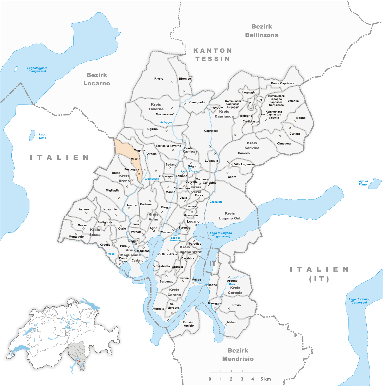 Municipality Veszio Artist: Tschubby